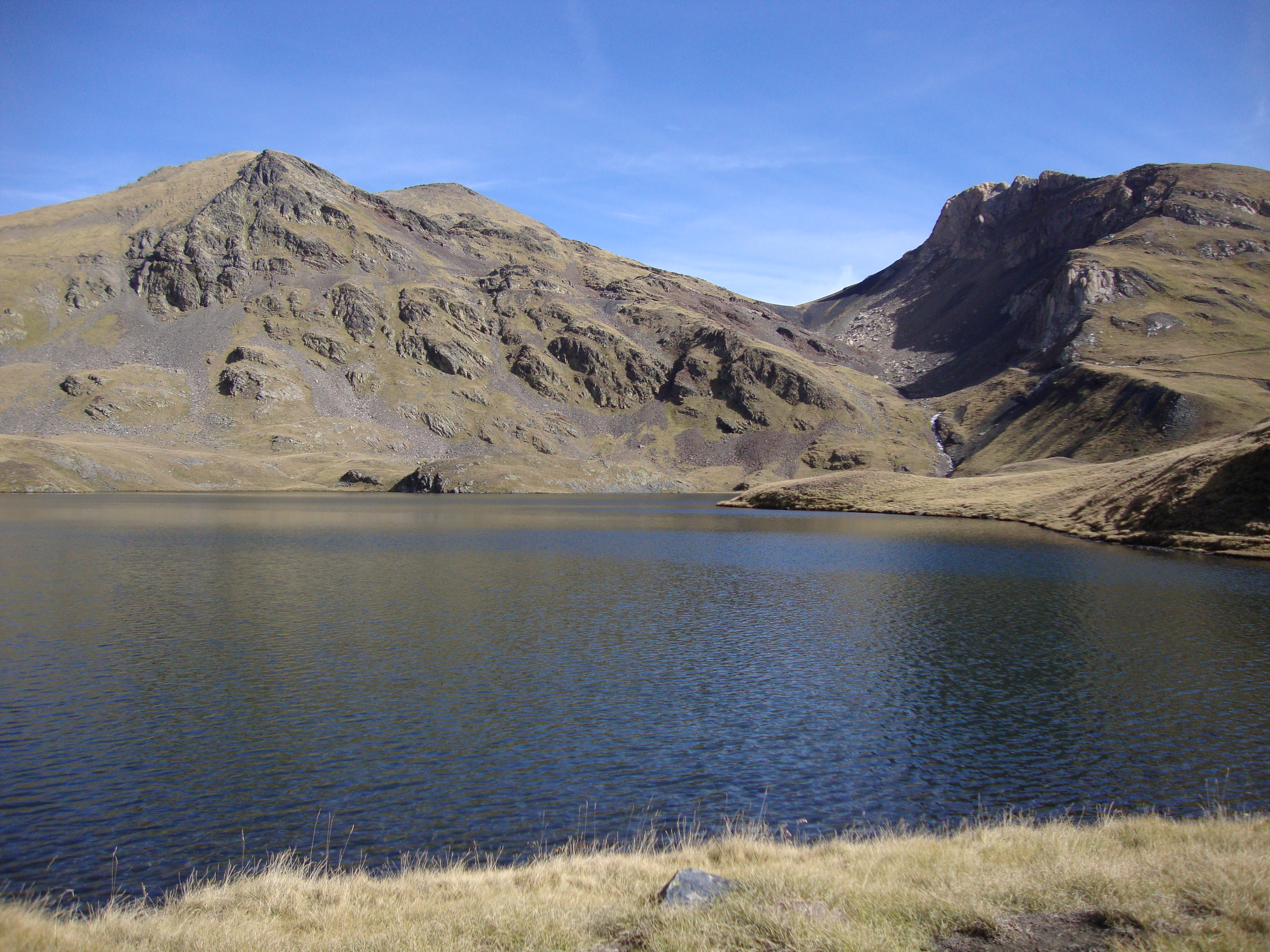 Tuc der Òme, Tuc de Montoliu e Lac de Montoliu